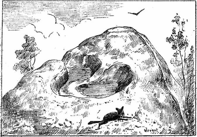 Dessin de Honoré Jacquinot de 1886, paru dans les Bulletins de la Société d'anthropologie de Paris et représentant les Rochers du dos de l'Âne à Saint-Agnan (Nièvre, France)